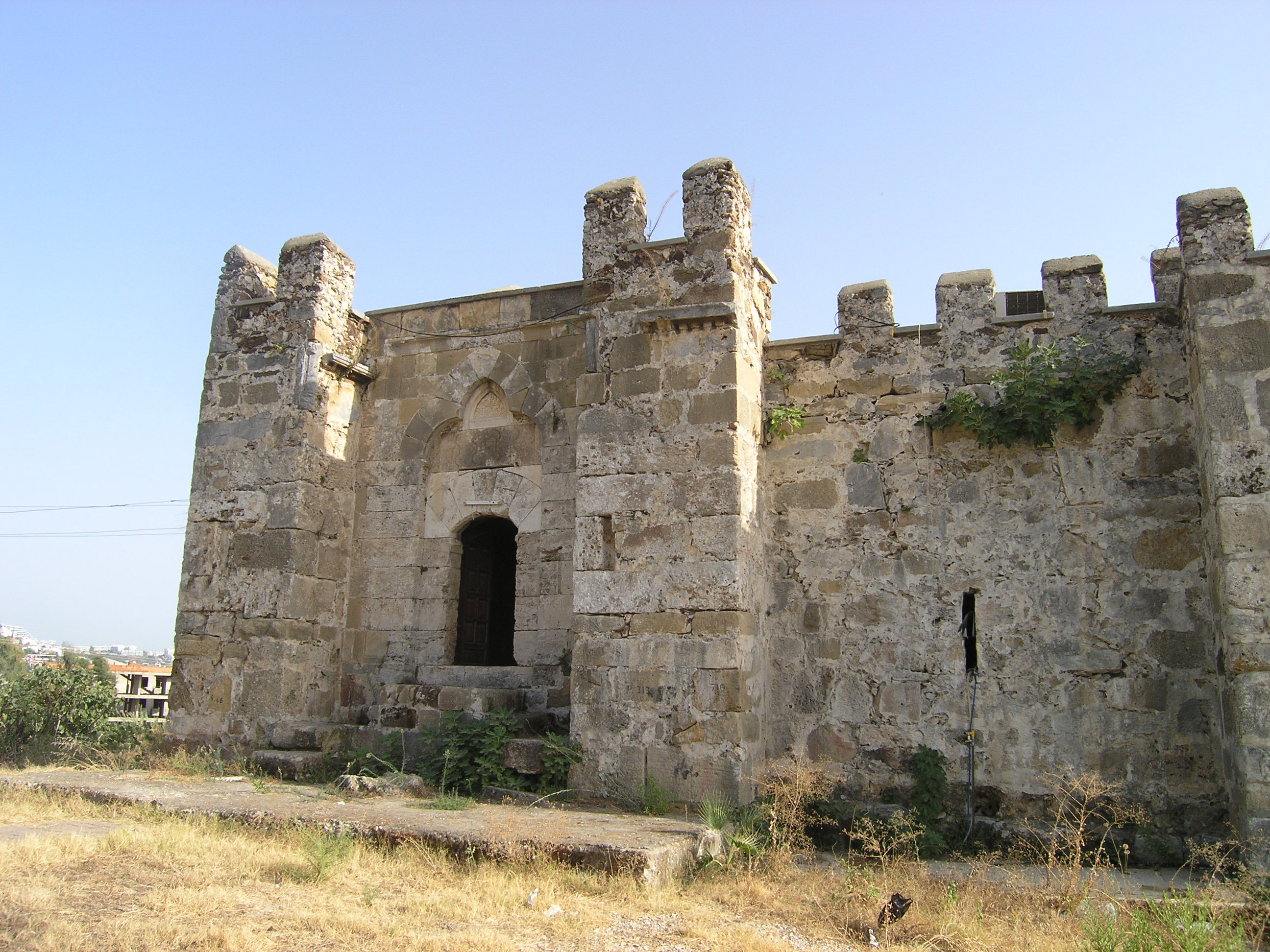 Șarapsa Han ist eine Karawanserei im Süden der Türkei. Gebetsraum im Nordosten.